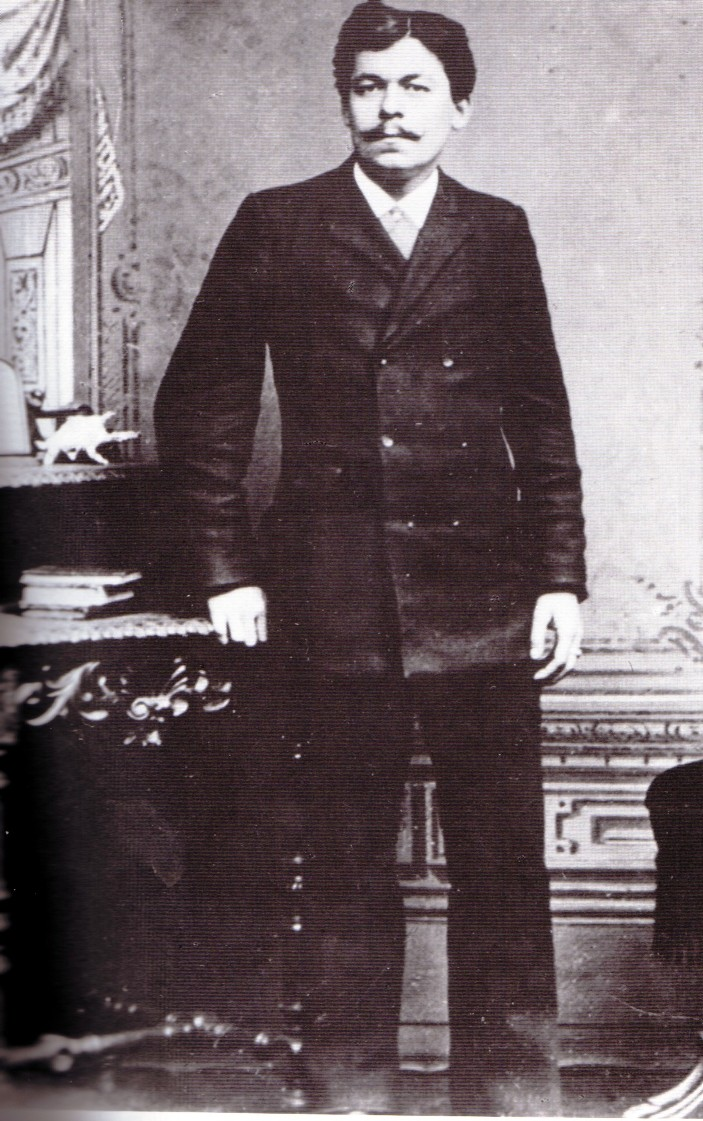 Friedrich Ebert im Jahr 1890